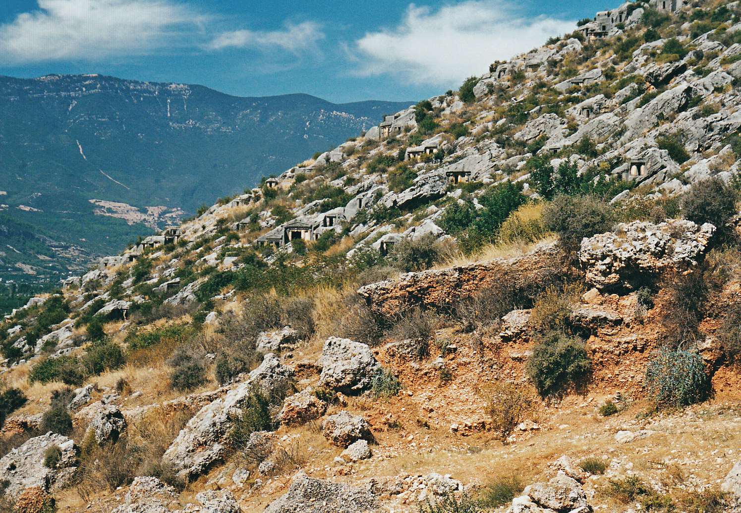 Limyra, Südwesttürkei, Nekropole